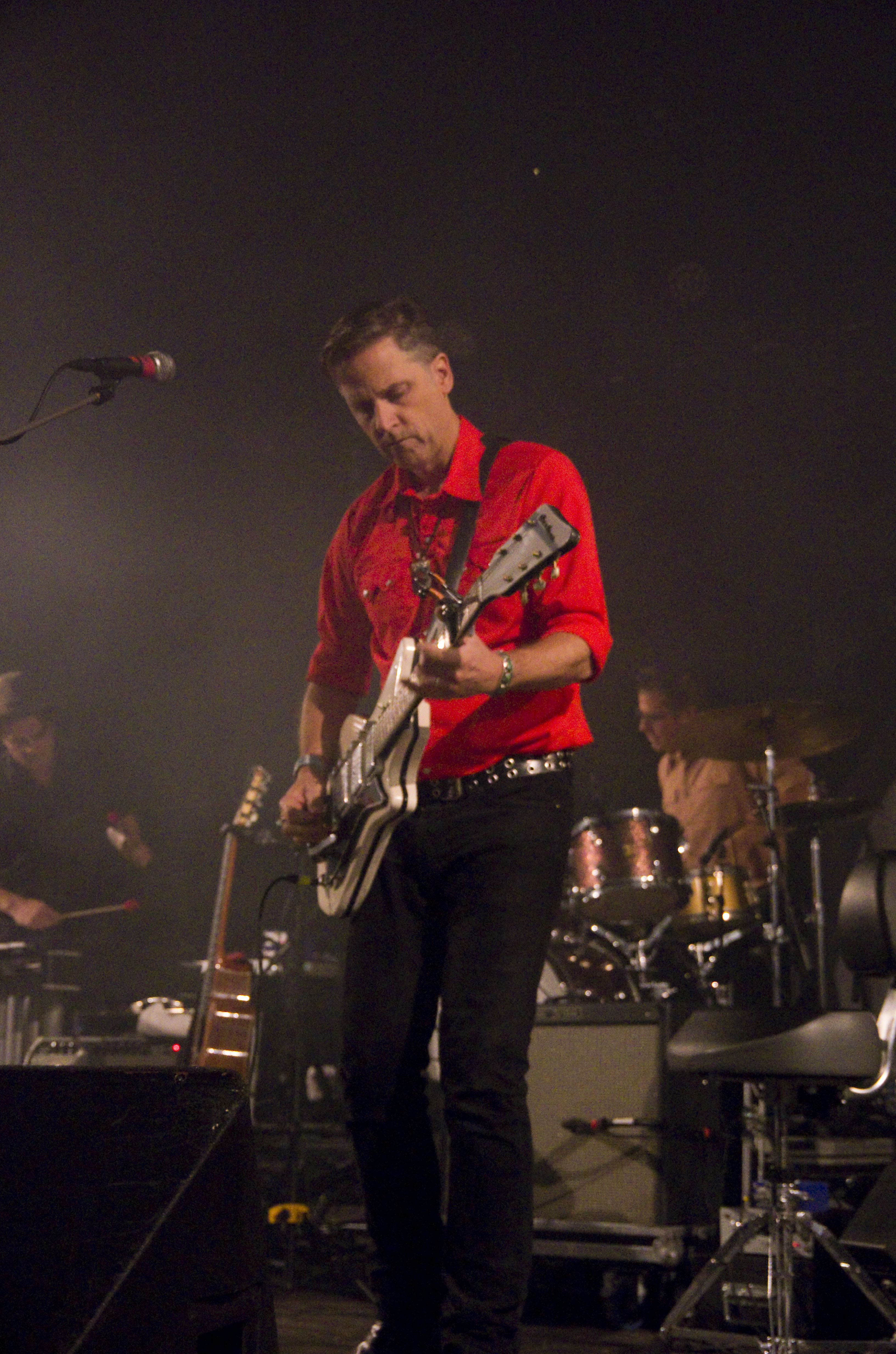 Das Zelt-Musik-Festival 2016 in Freiburg im Breisgau 13.07.2016 Calexico